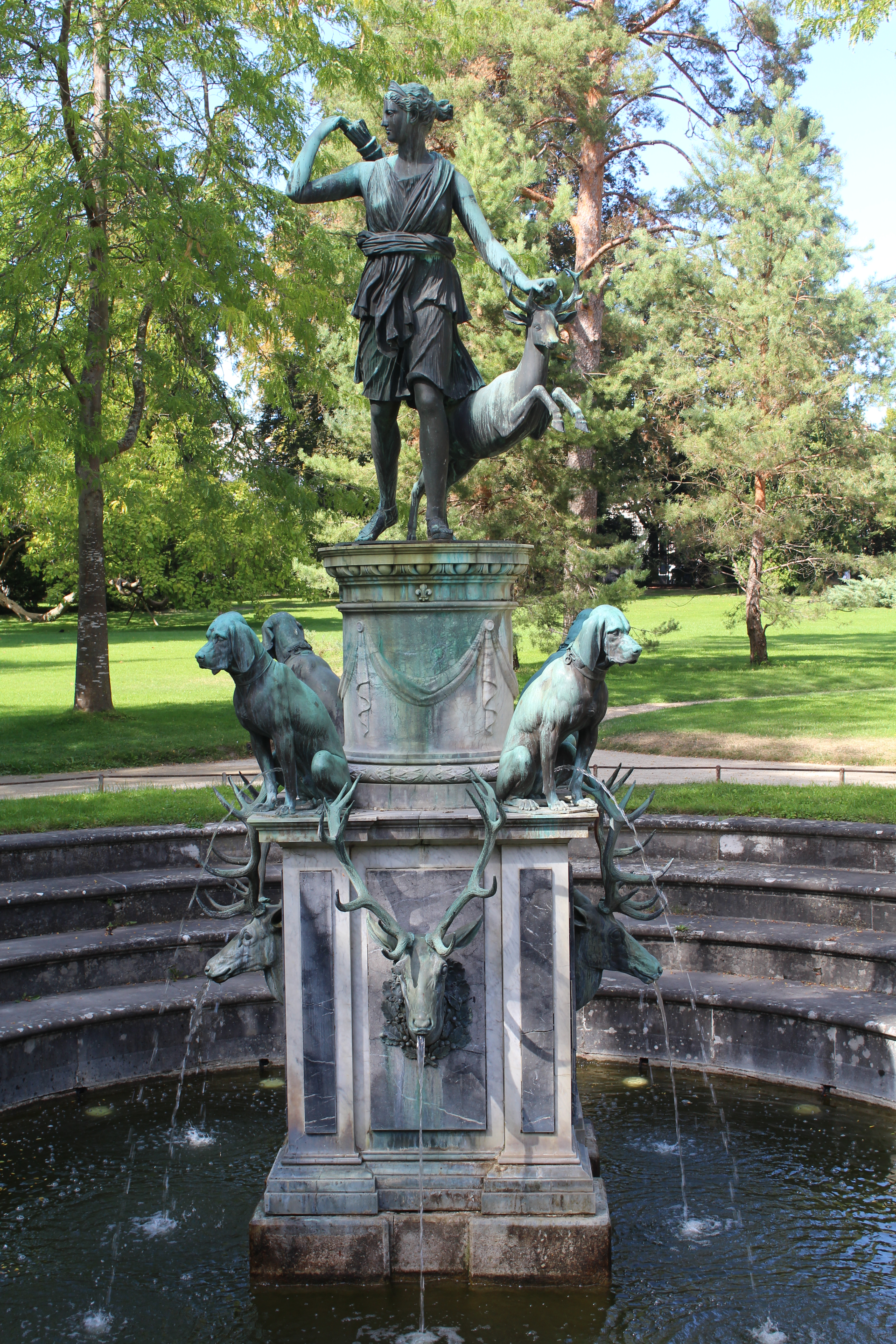 Fontaine de Diane, Fontainebleau.